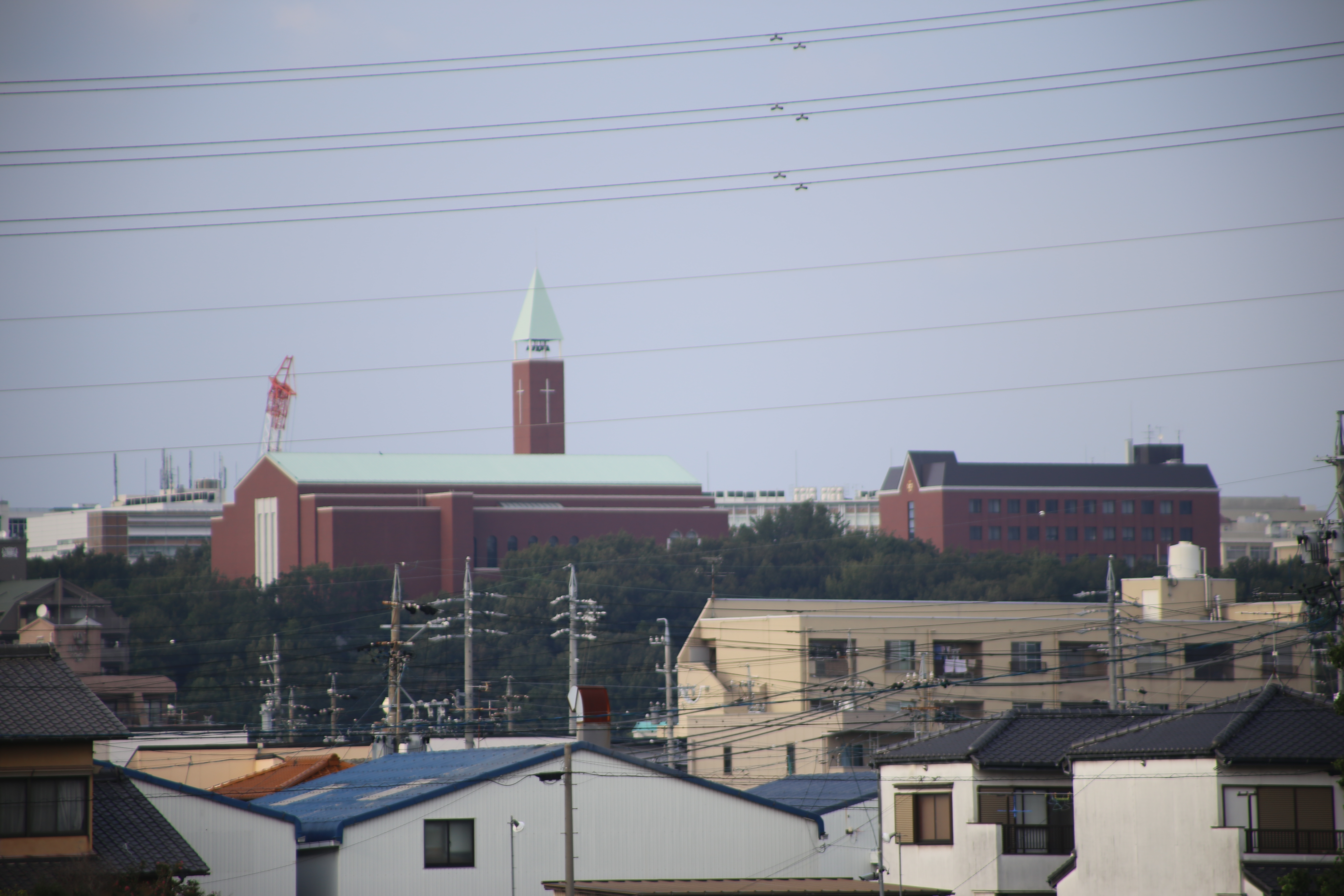 名古屋市守山区大森二丁目の金城学院大学を小原橋より望遠撮影